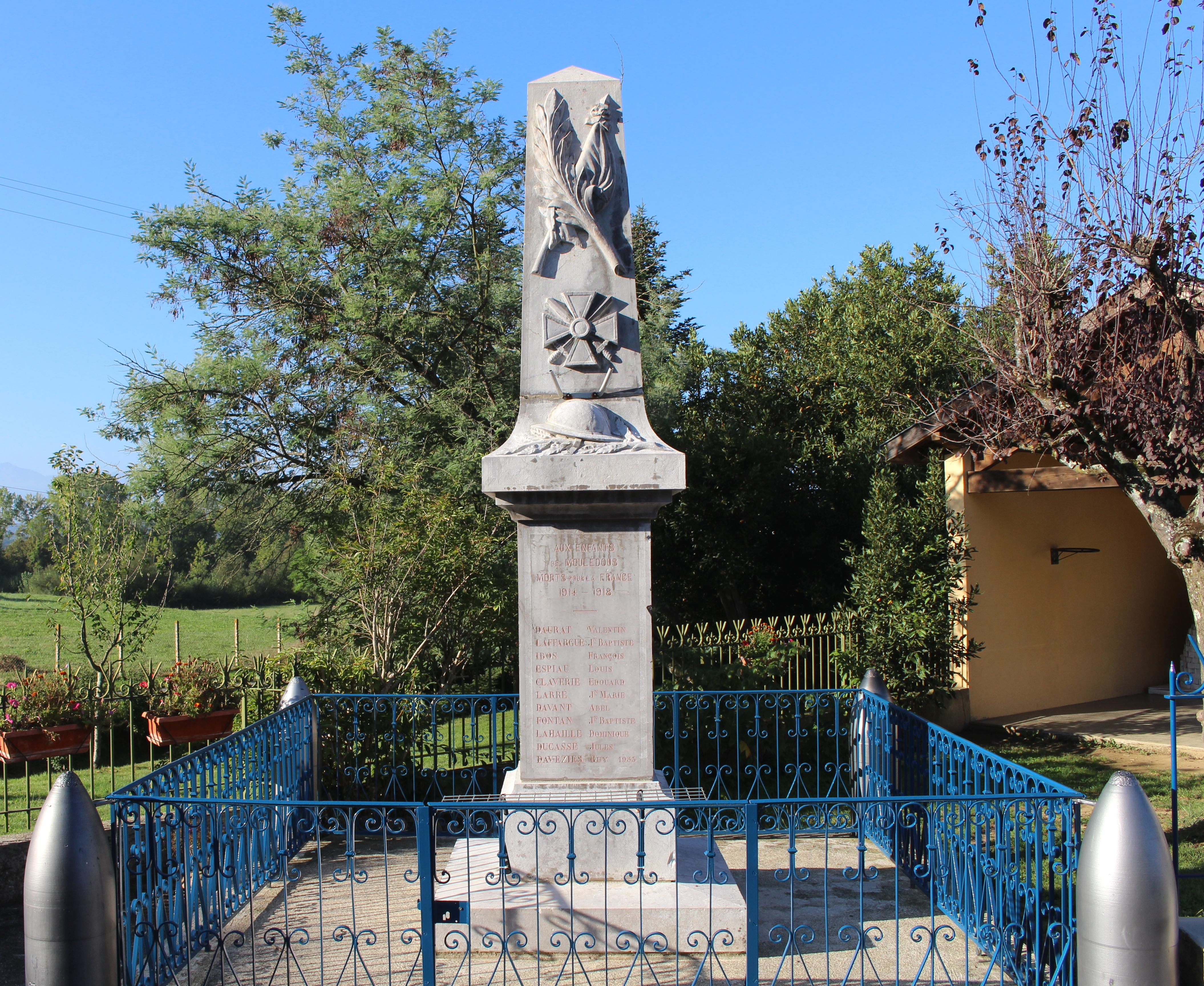 Monument aux morts de Moulédous (Hautes-Pyrénées)